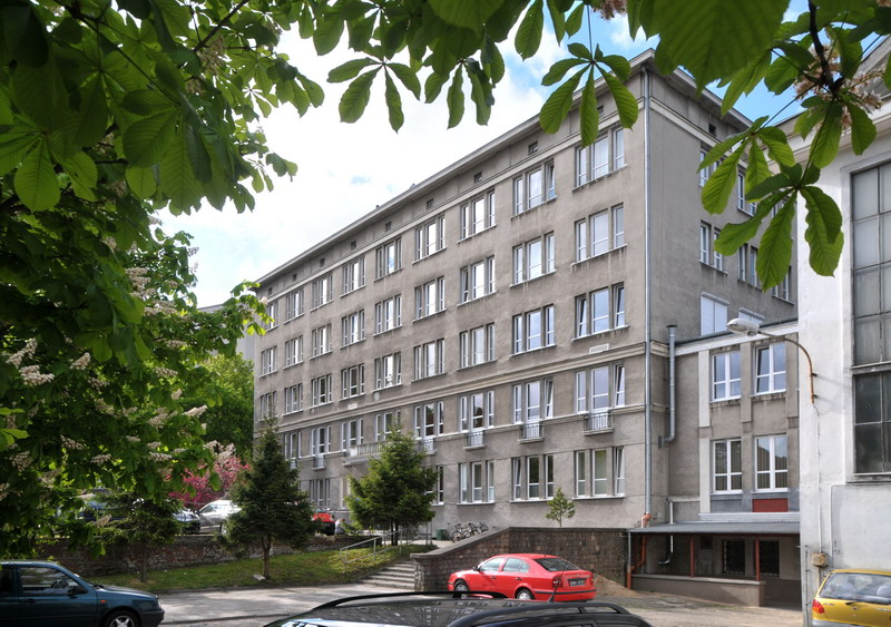 Wydział Inżynierii Lądowej i Środowiska z halą